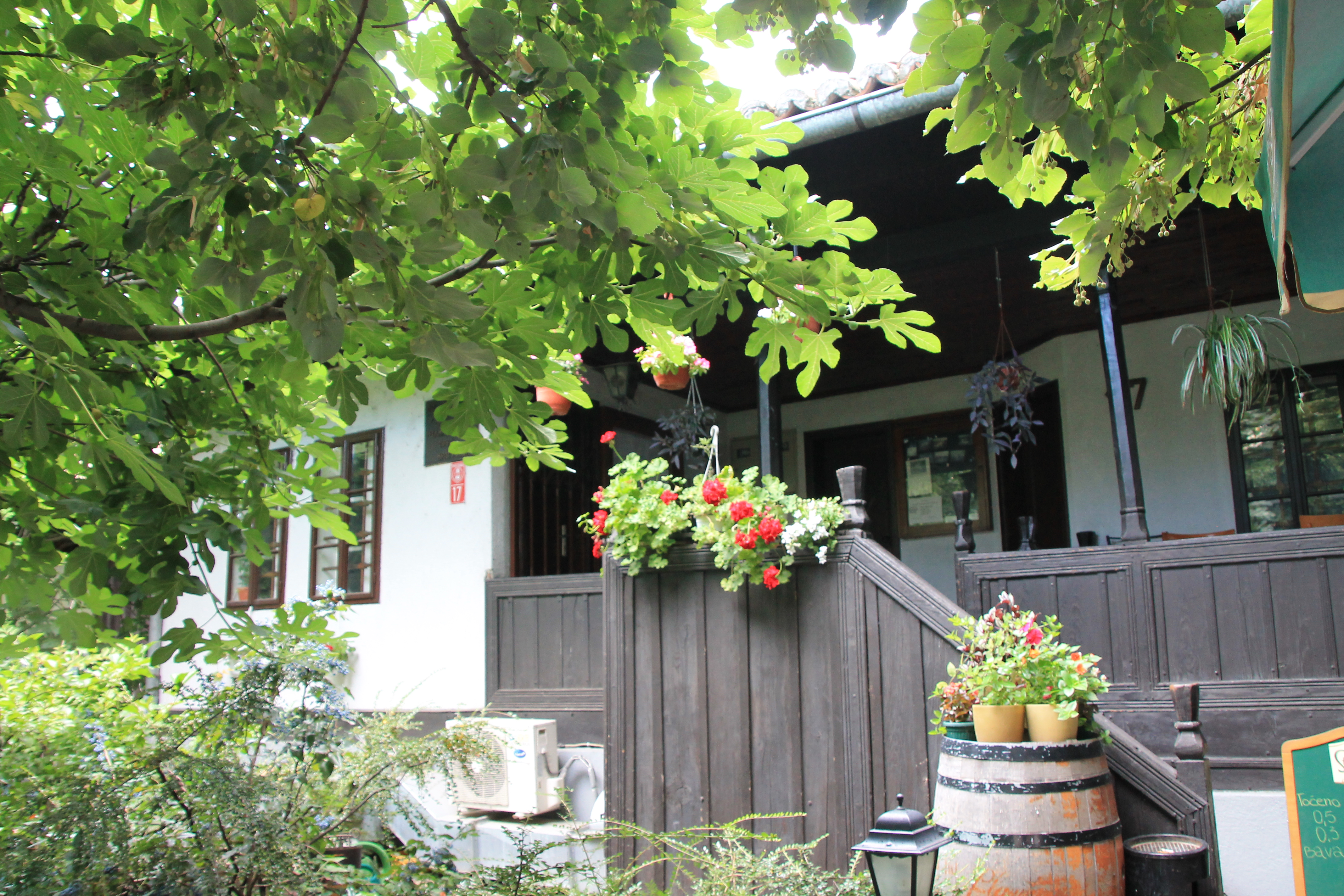 Kuće u Svetozara Markovića (Kragujevac)